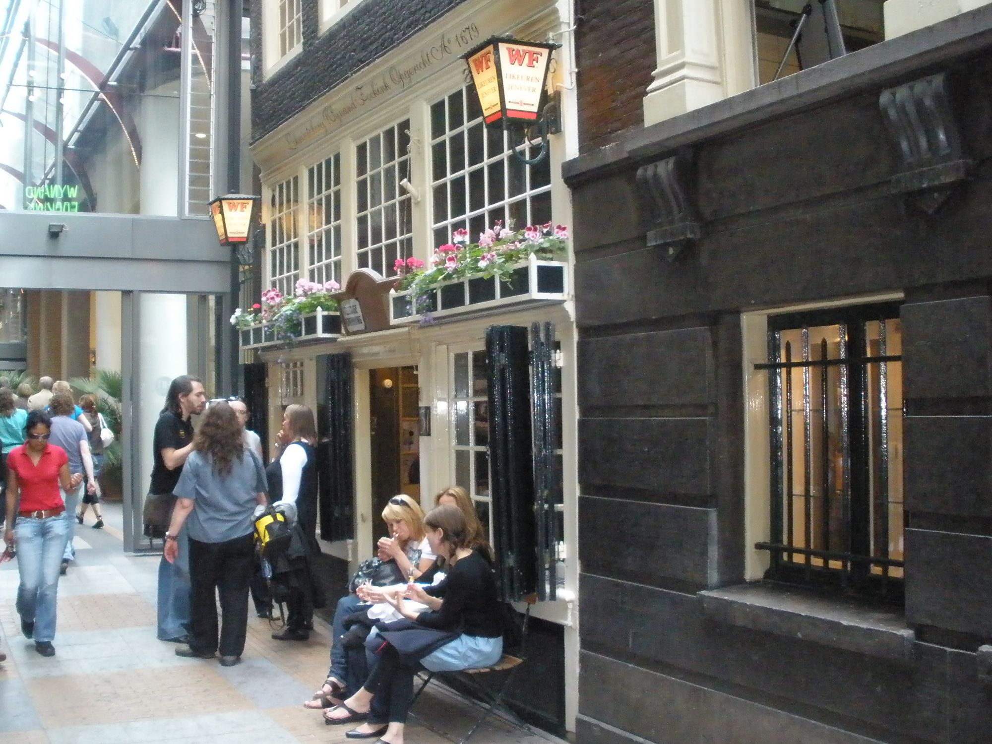 The Pijsteeg, an alley in Amsterdam, the Netherlands